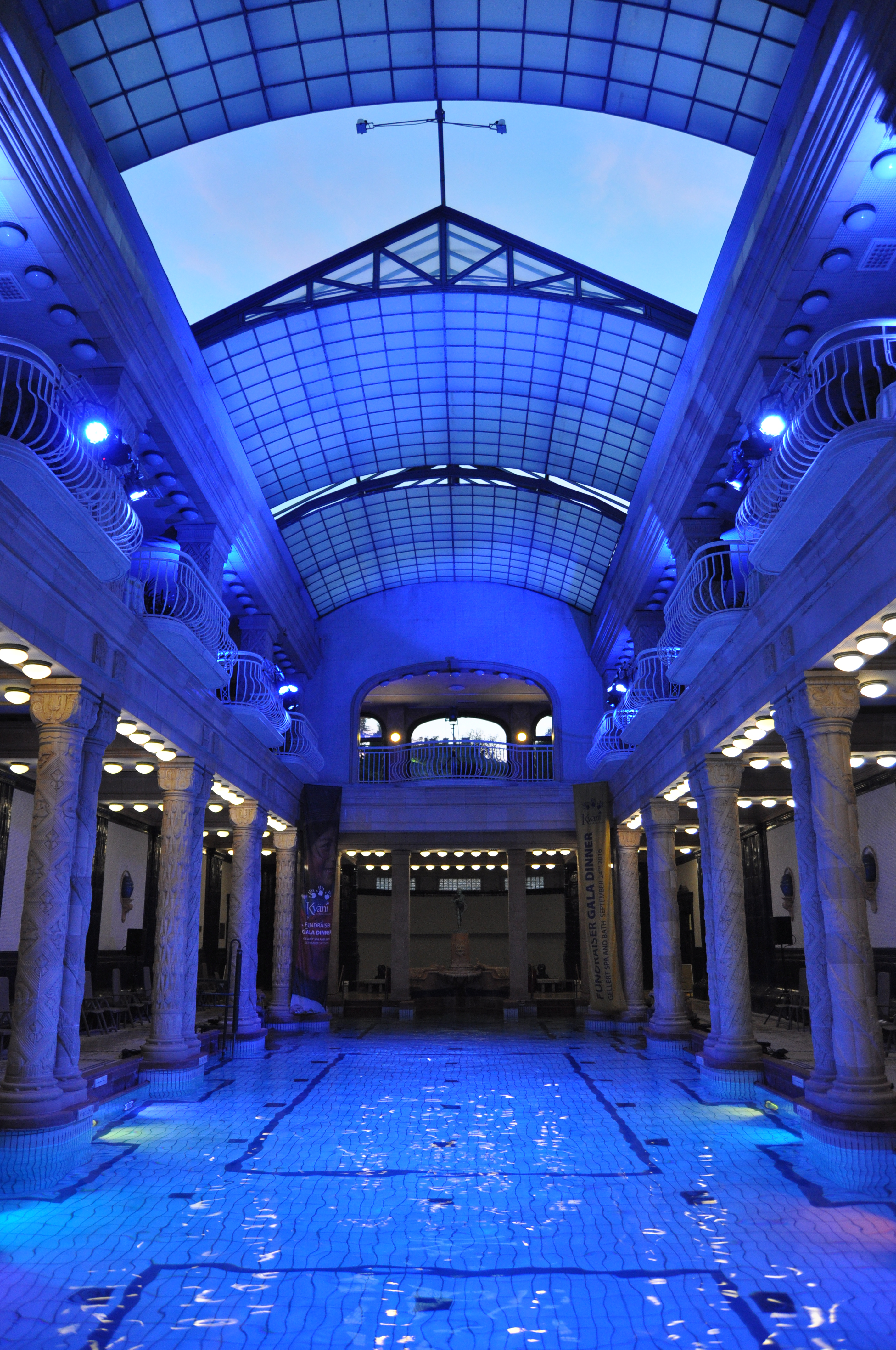 Budapest, Gellért fürdő, úszómedence